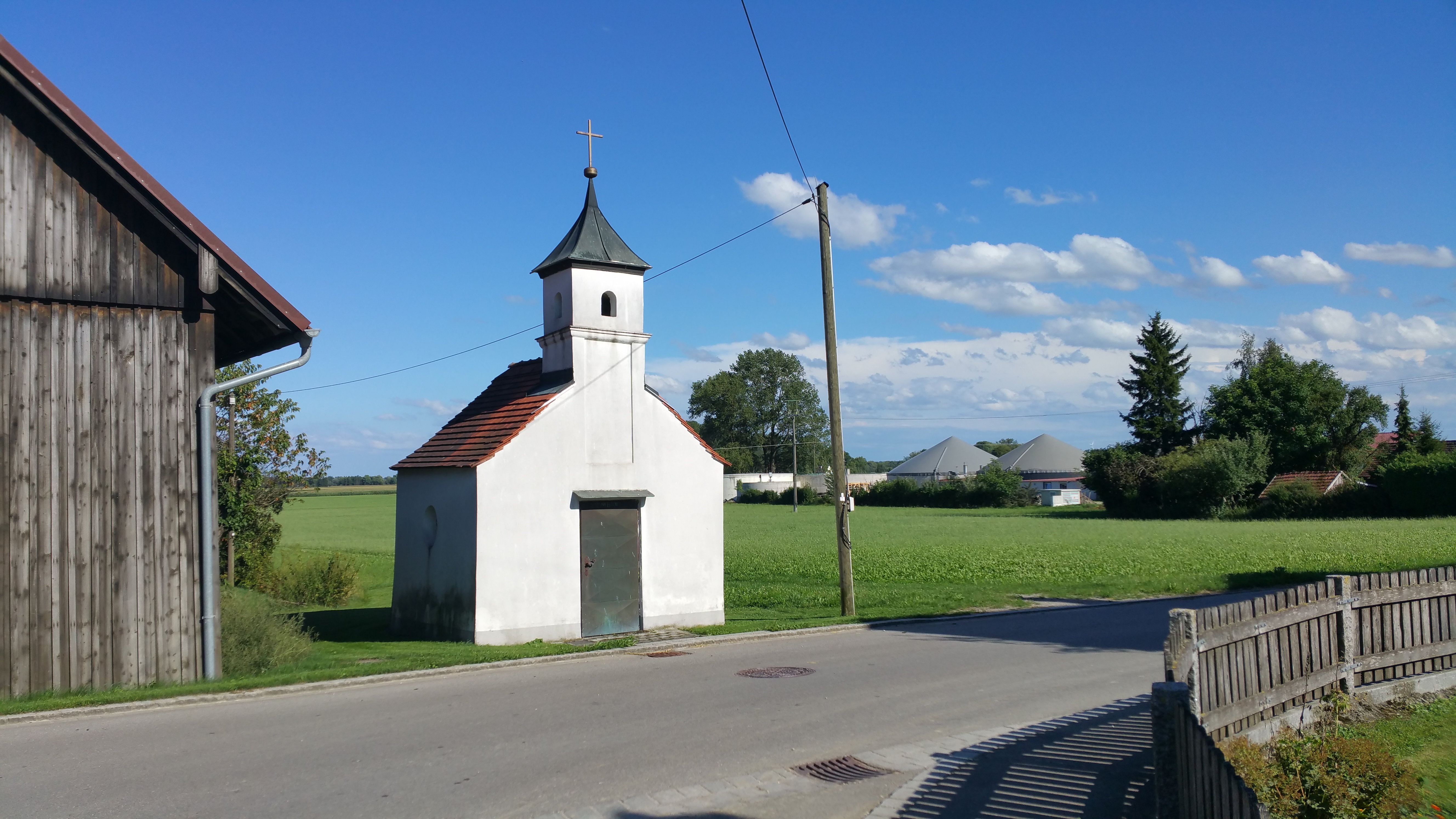 Ortskapelle in Aletshofen, Gemeinde Ettringen (Wertach)